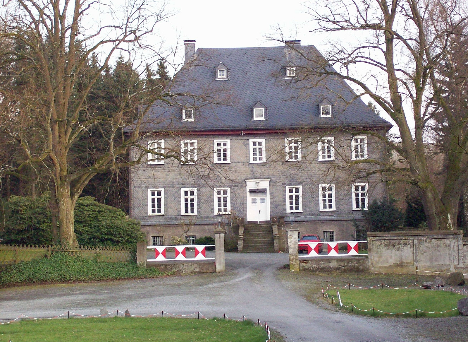 Meschede-Bockum, Gut Bockum (ehemaliges Rittergut), Anno 1398 (Germany)